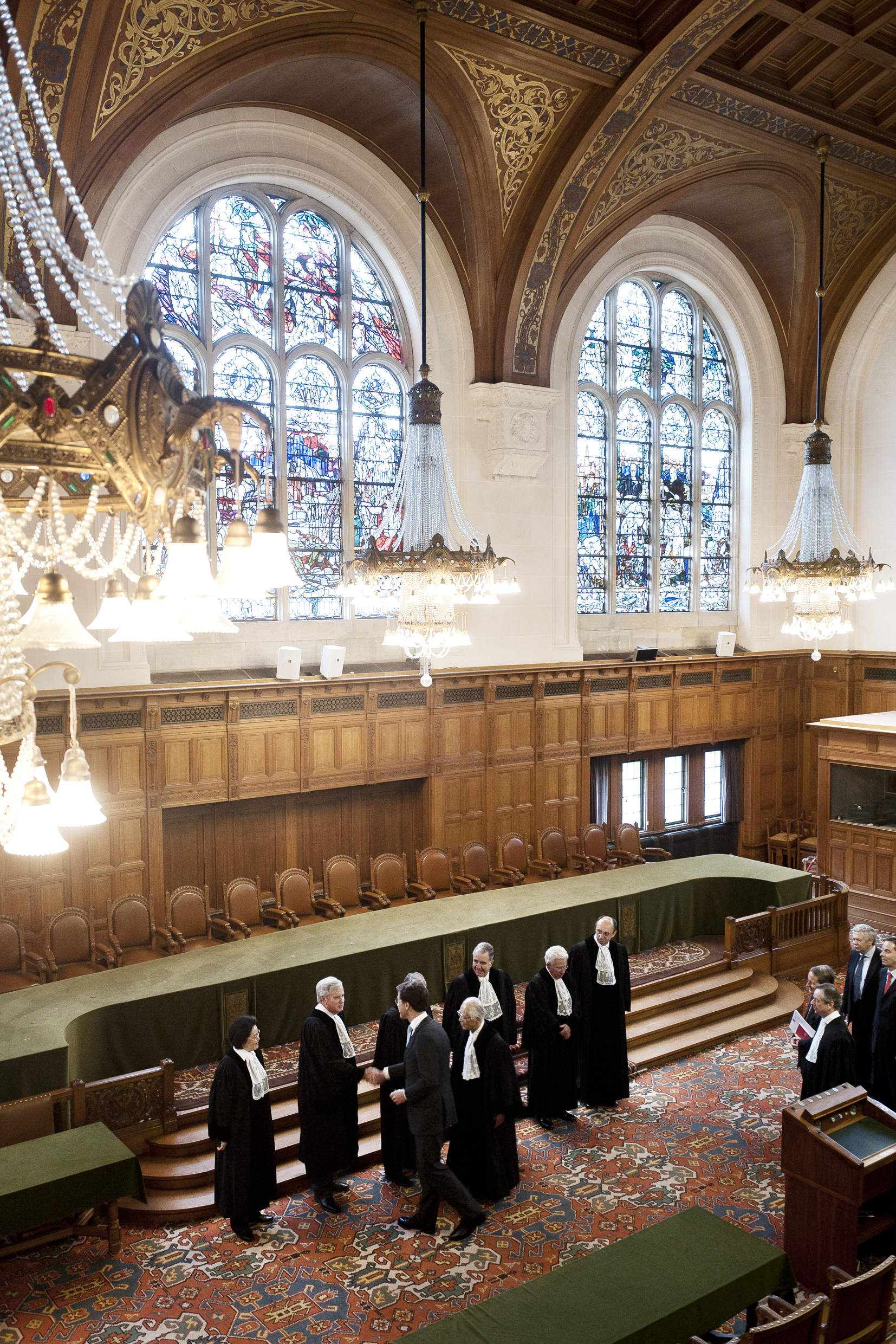 Minister-president Rutte tijdens zijn bezoek aan het Internationaal Gerechtshof. Het Internationaal Gerechtshof is gevestigd in het Vredespaleis in Den Haag. Het Hof is de hoogste rechtsprekende instantie in de wereld en behandelt geschillen tussen staten. Als enig hoofdorgaan van de VN is het niet in New York maar in Den Haag gevestigd, de juridische hoofdstad van de wereld.